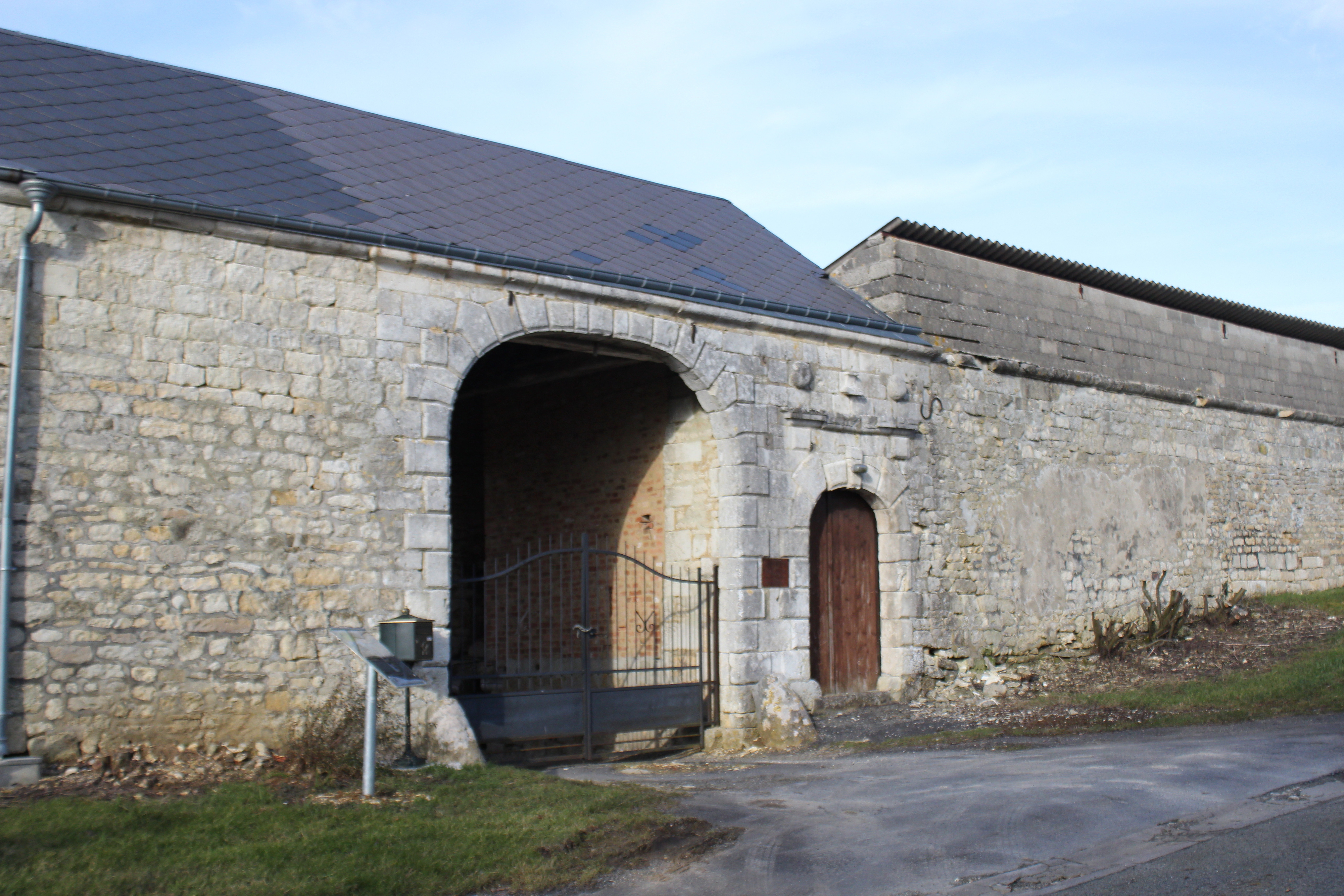 Ferme du Maipas, Prez, Ardennes, France (XVIIe siècle) : entrée avec porte charretière en anse de panier et entrée piétonne